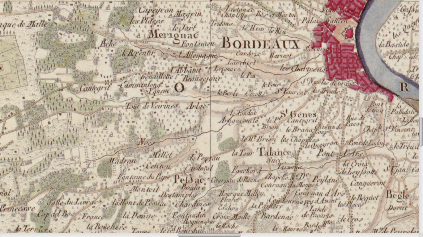 Carte de Cassini n°104 (Gironde, zoom sur les ruisseaux de Bordeaux), 1756.